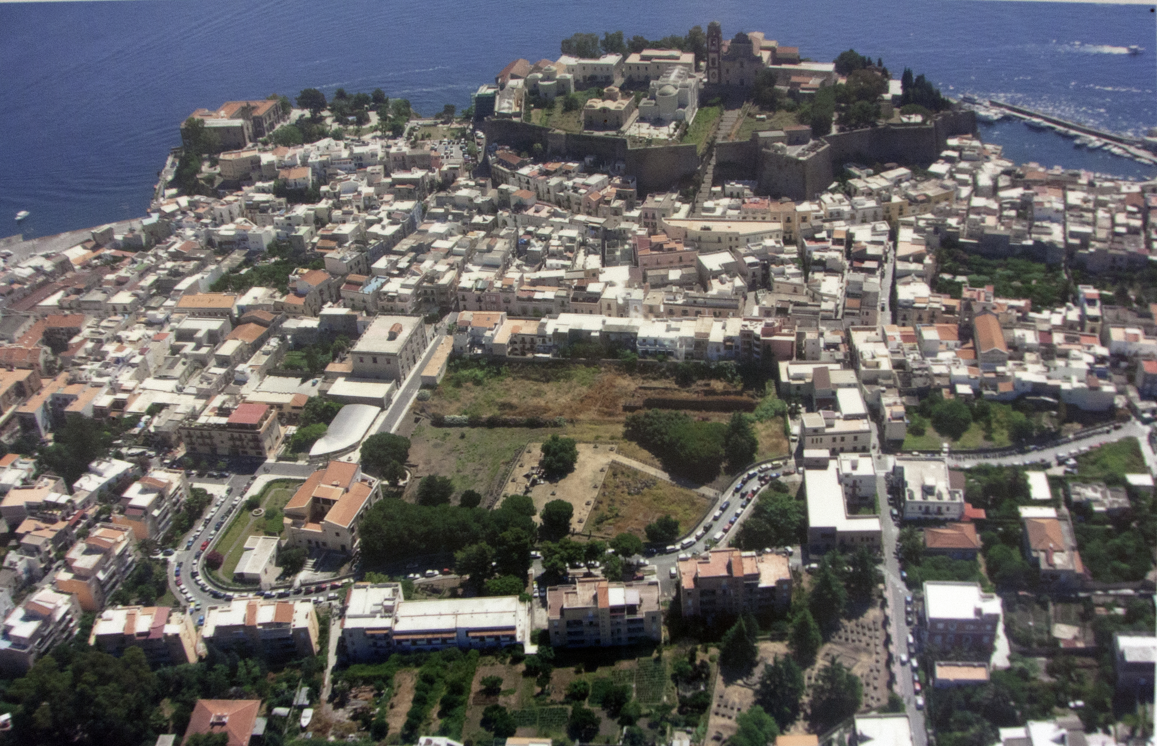 Parco di contrada Diana